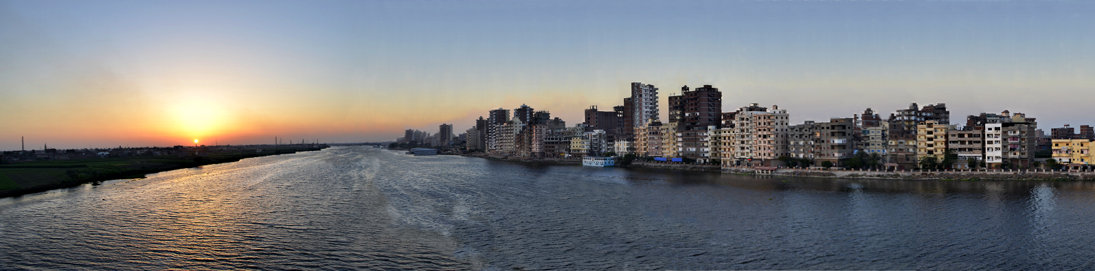 صورة بانورامية لمدينة دسوق (اليمين) ونهر النيل (الوسط)، وجزيرة الرحمانية (يساراً)، مصر